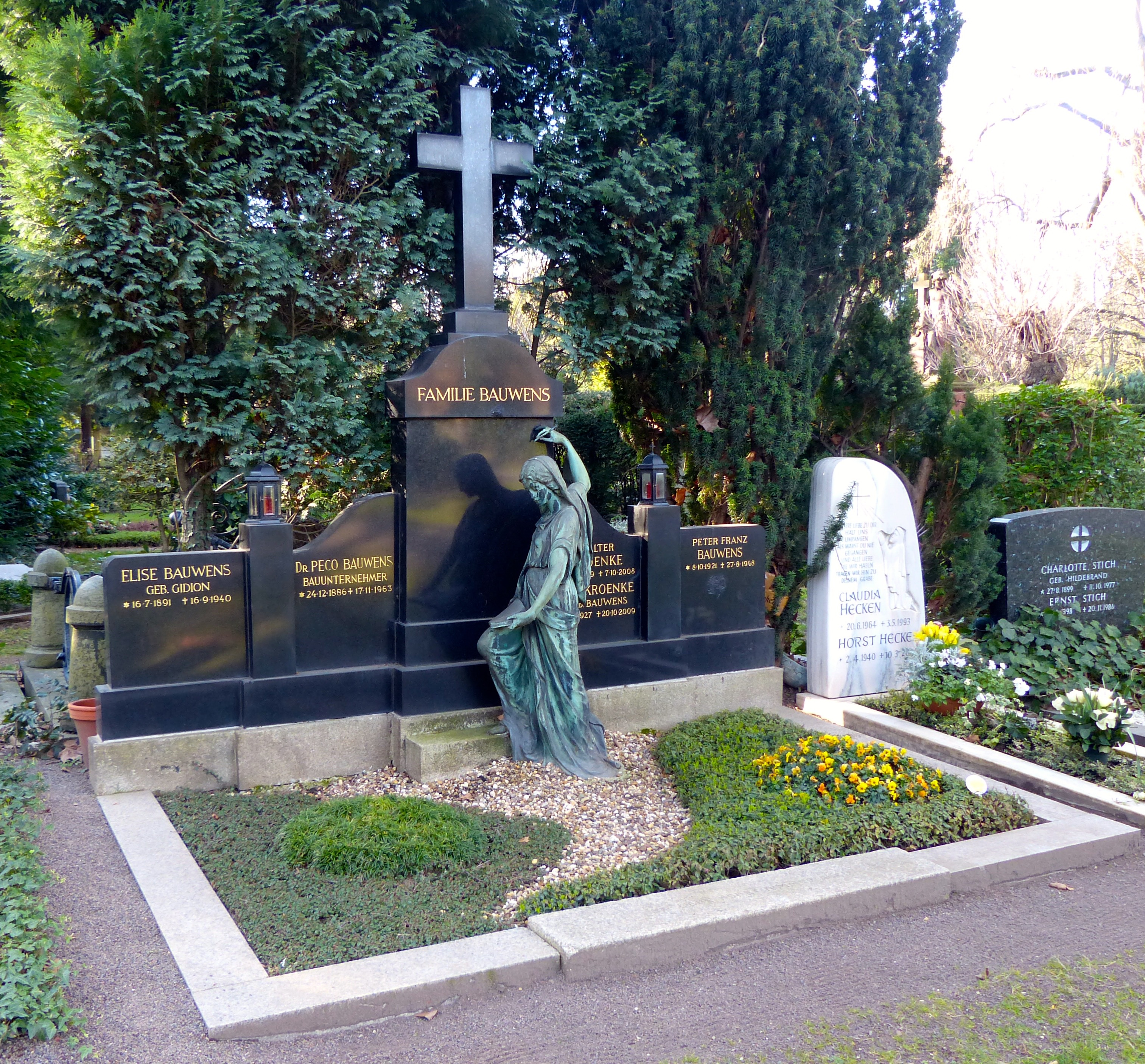 Grabstelle auf dem Melaten-Friedhof: Peco Bauwens (eigentlich Peter Joseph Bauwens; * 24. Dezember 1886 in Köln; † 24. November 1963 ebenda) war ein deutscher Fußball-Nationalspieler, internationaler Schiedsrichter und von 1950 bis 1962 erster Präsident des Deutschen Fußball-Bundes (DFB).